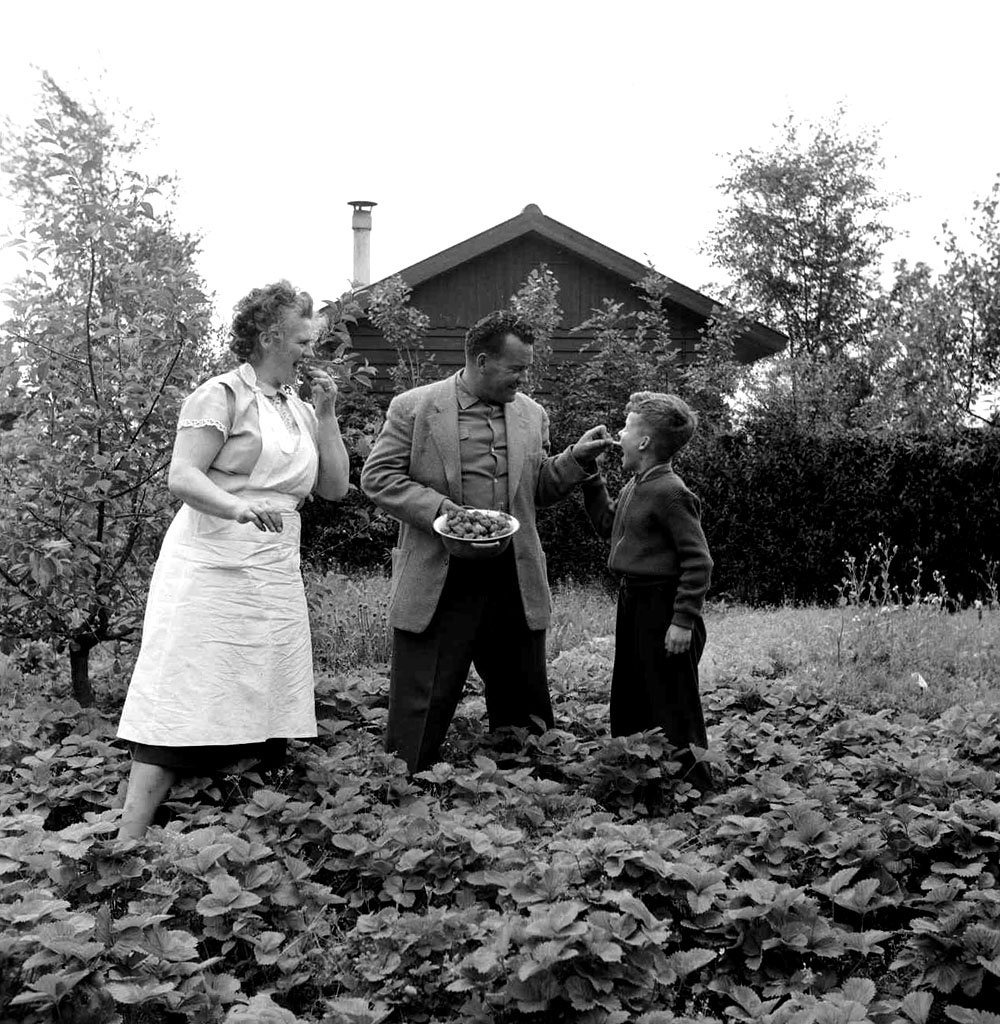 Ploegleider Kees Pellenaars en zijn gezin in de moestuin, Breda, 1 juli 1954 Foto Ben van Meerendonk / AHF, collectie IISG, Amsterdam